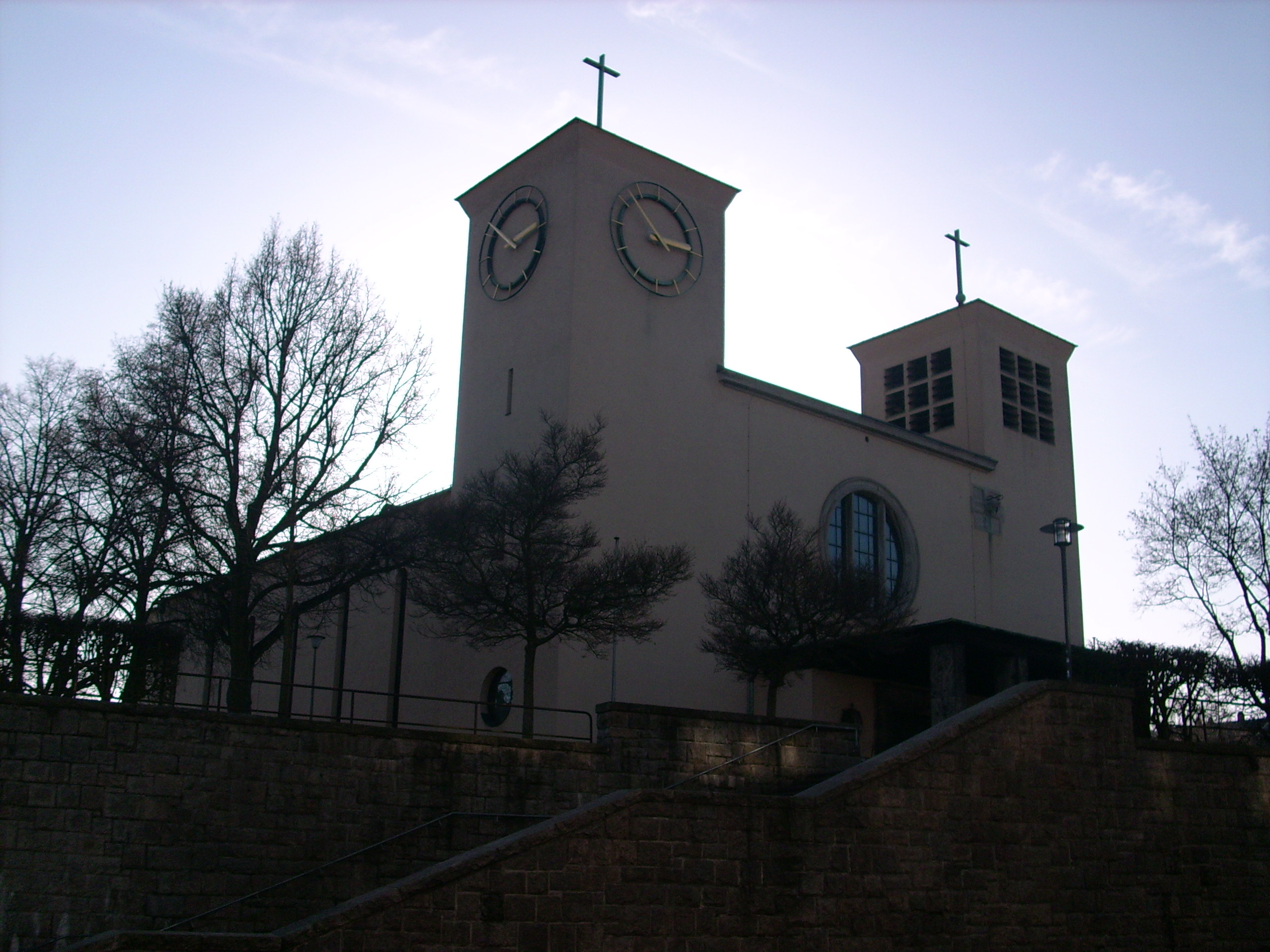 Außenansicht der Herz-Jesu-Kirche (Weiden in der Oberpfalz), Deutschland.